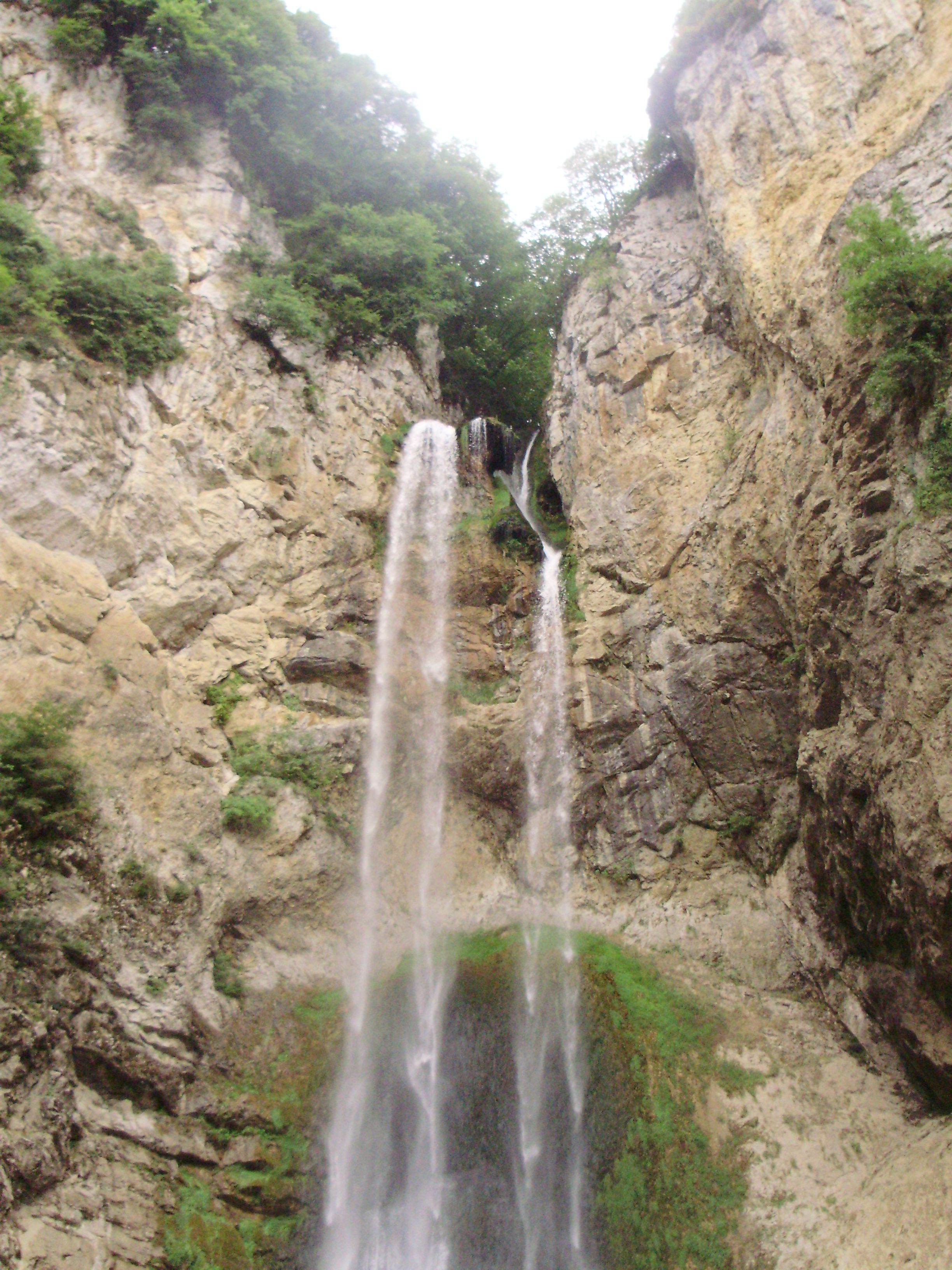 Vodopad Bliha